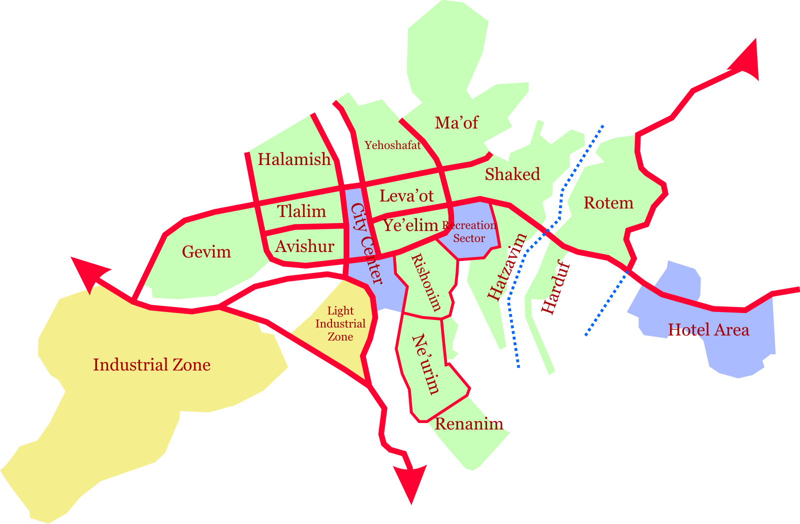 gemaakt en in het publiek domein geplaatst door ynhockney van en.wikipedia. volg interwiki voor meer informatie Licensing Image:AradMap.png